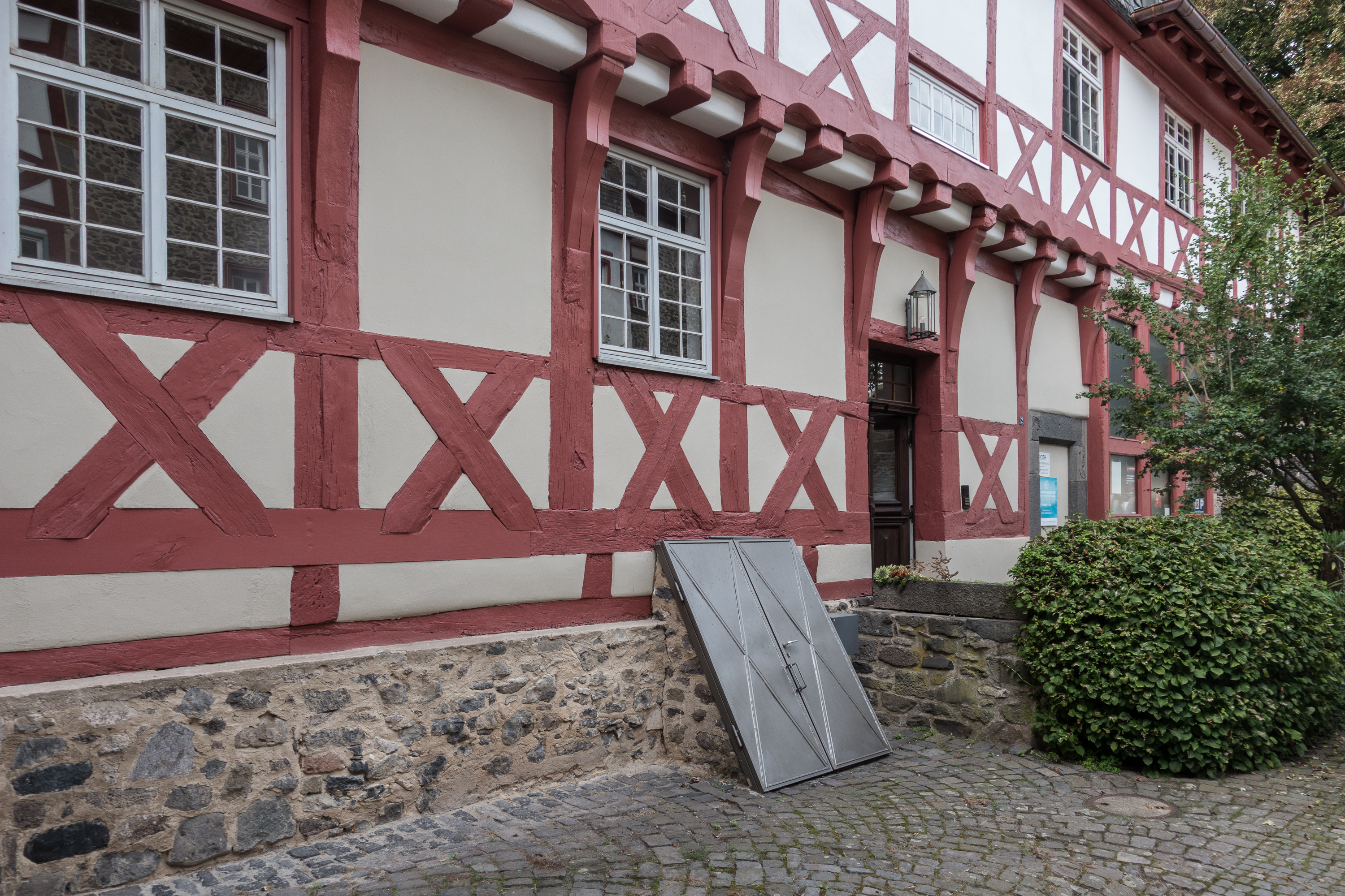 Mönchsbau um 1500 vom Innenhof aus. Das Antoniterkloster in Grünberg wurde um 1200 gegründet und bestand bis zur Einführung der Reformation in der Landgrafschaft Hessen im Jahre 1526. Ab 1577 wurde die Anlage zu einem landgräflichen Schloss (Wittwensitz) umgebaut.